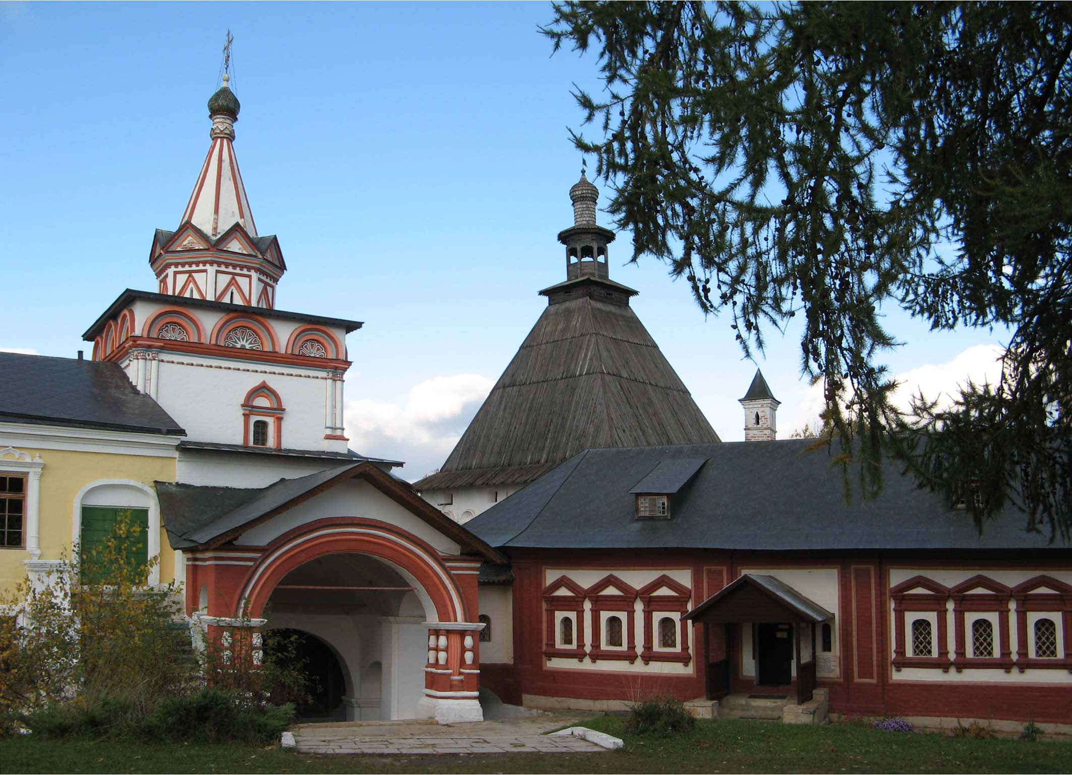 Звенигород, Саввино-Сторожевский монастырь